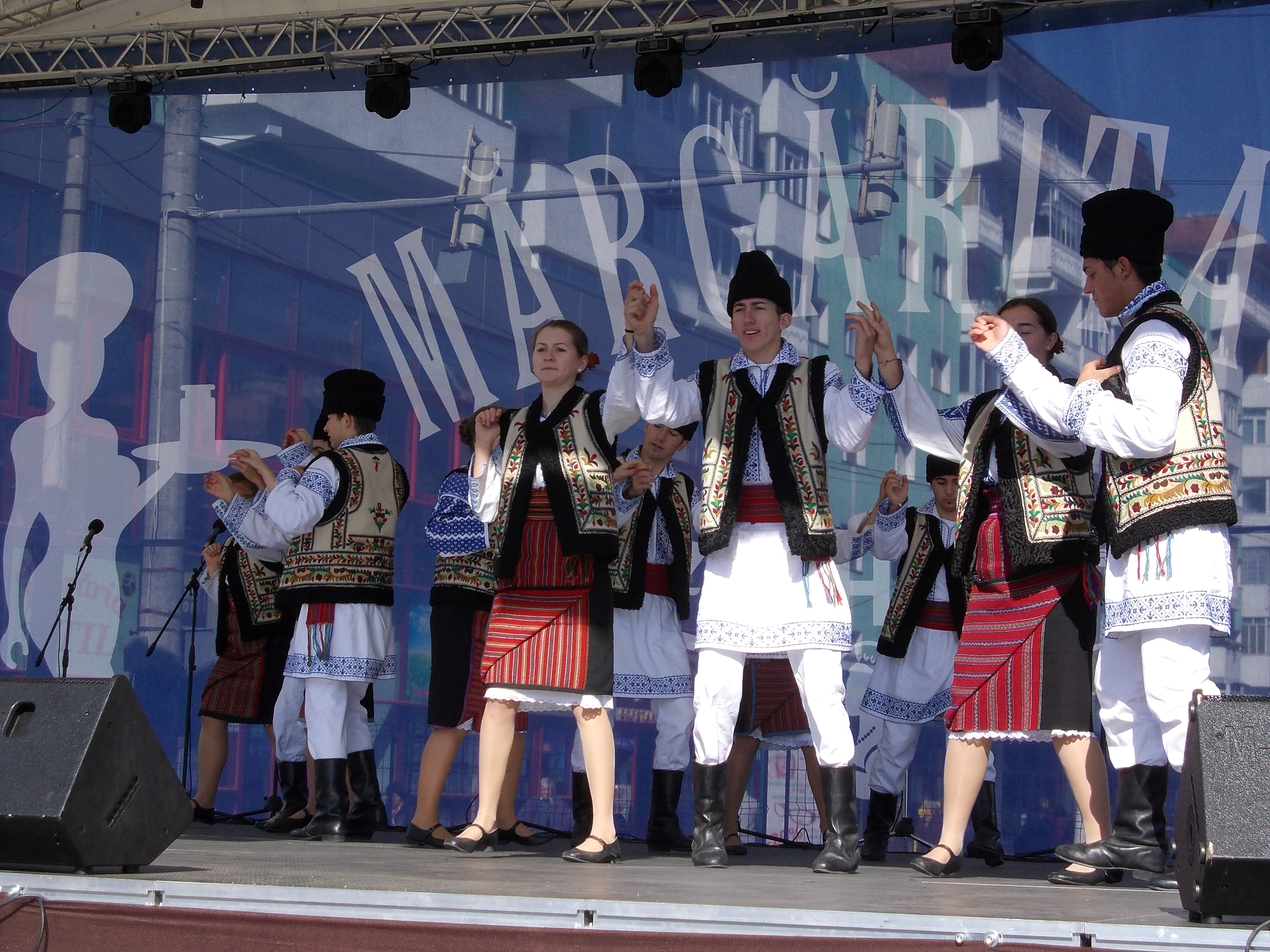 Ansamblul folcloric Izvoraşul din Săbăoani, Neamţ. Port popular moldovenesc